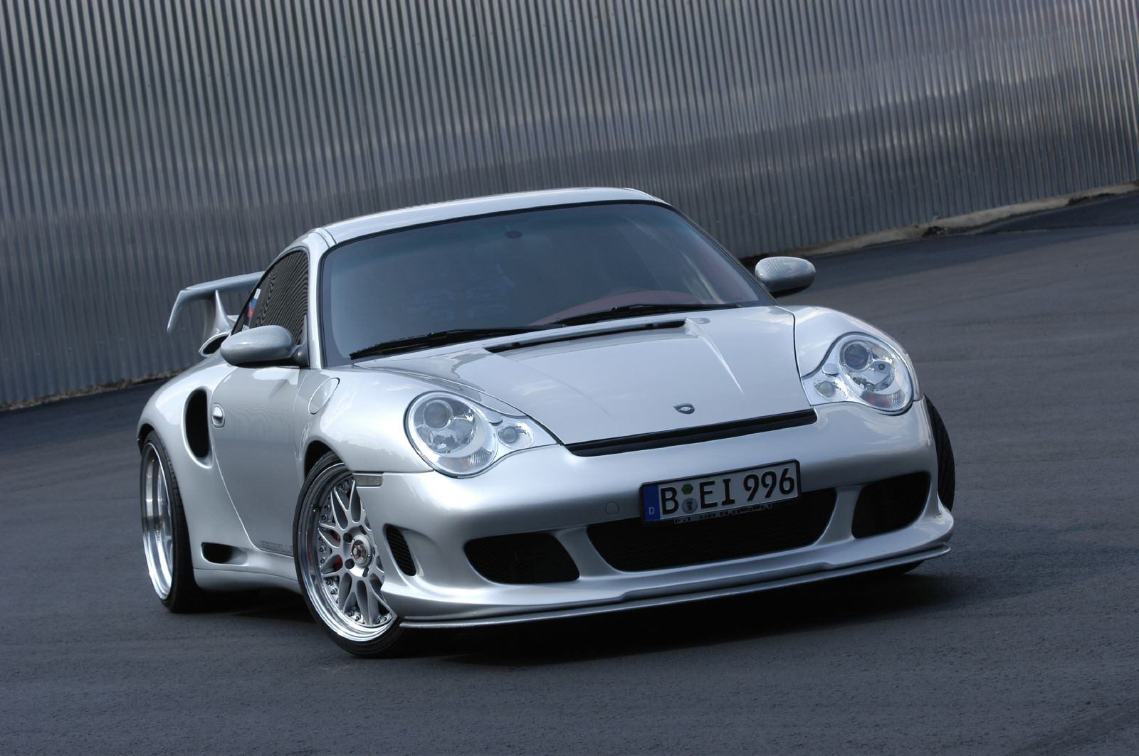 Gemballa GTR 650 Evo 001.jpg